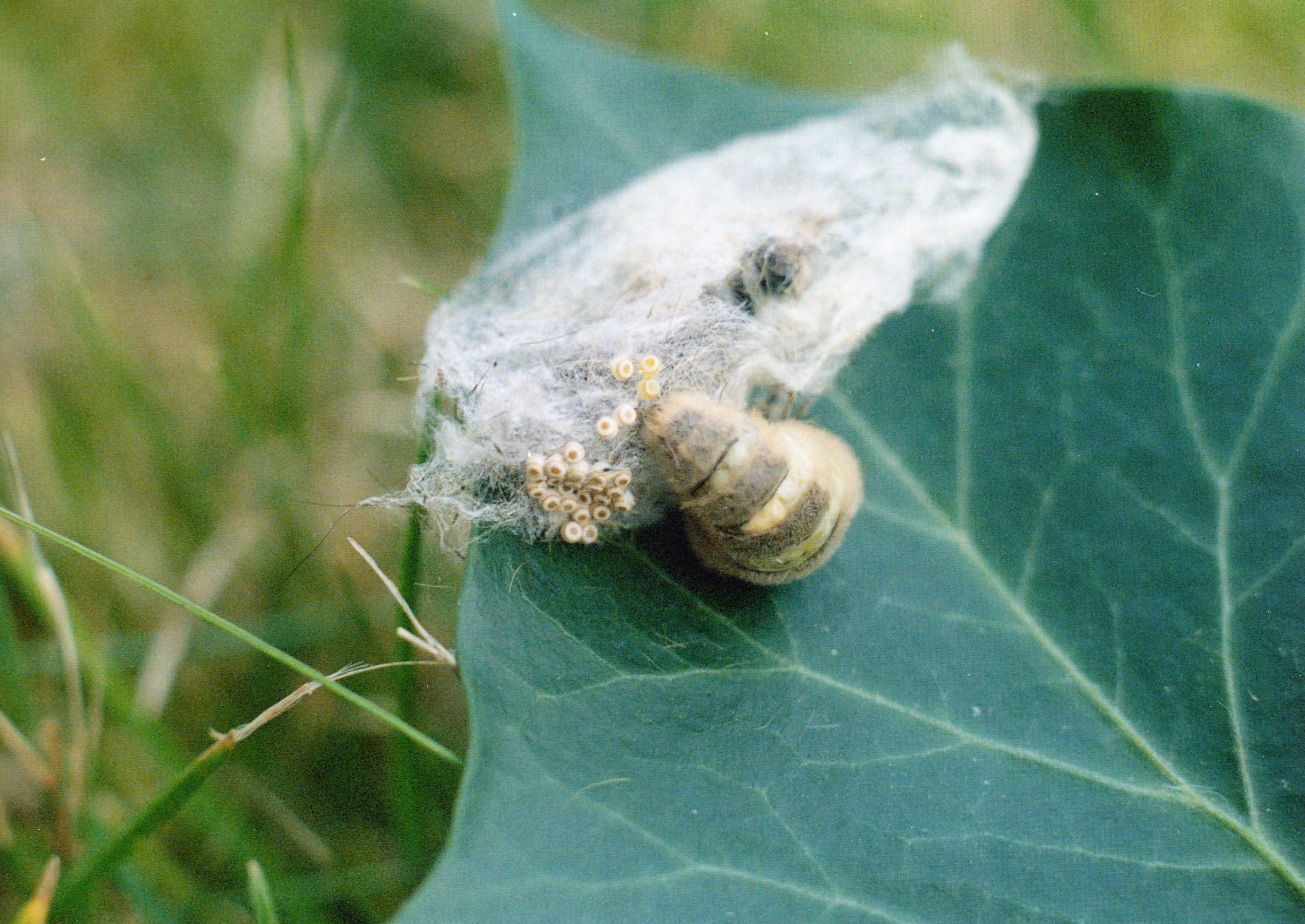 Orgyia antiqua female laying eggs